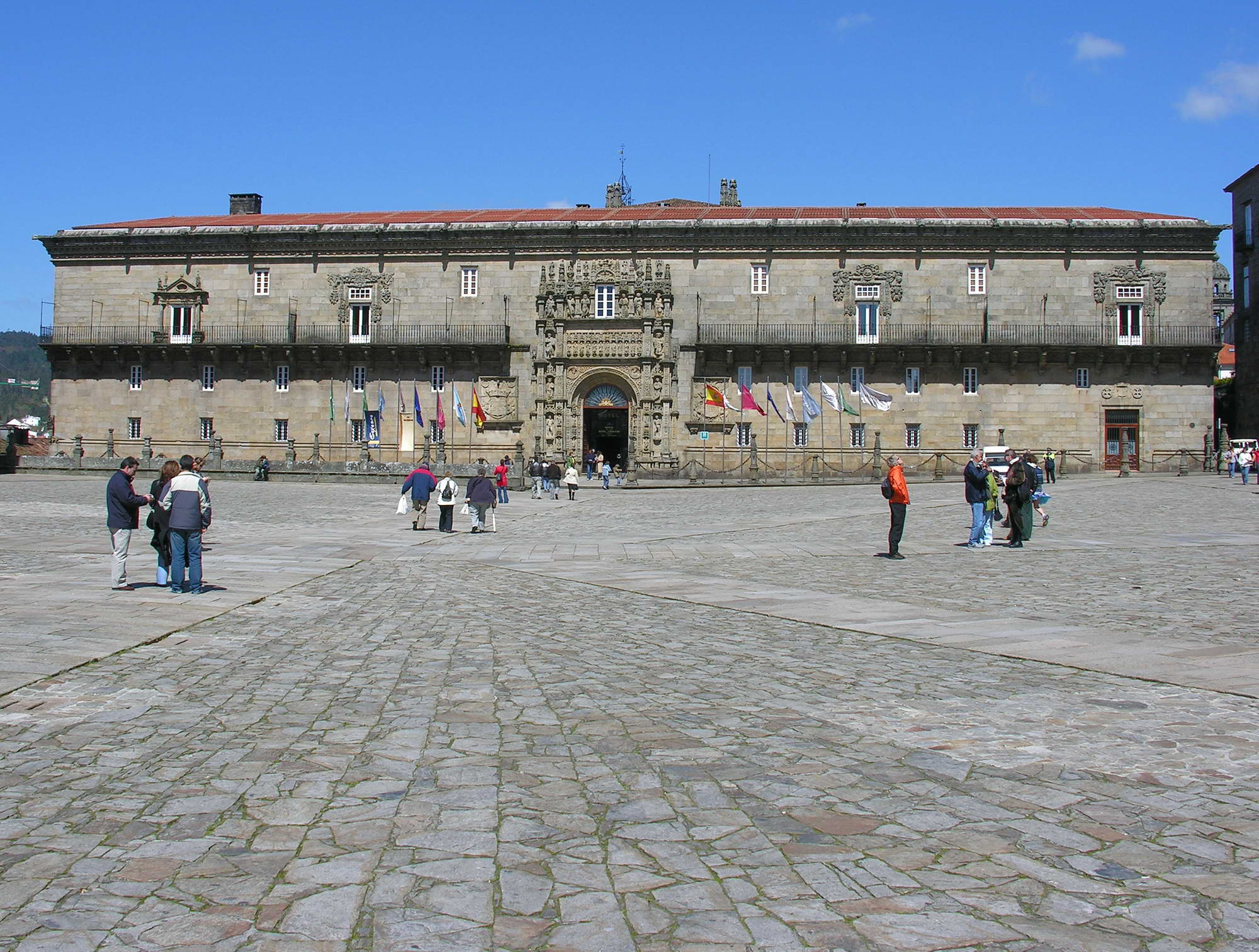 self made. Hostal dos Reis Católicos. Santiago de Compostela, Galicia, Spain.